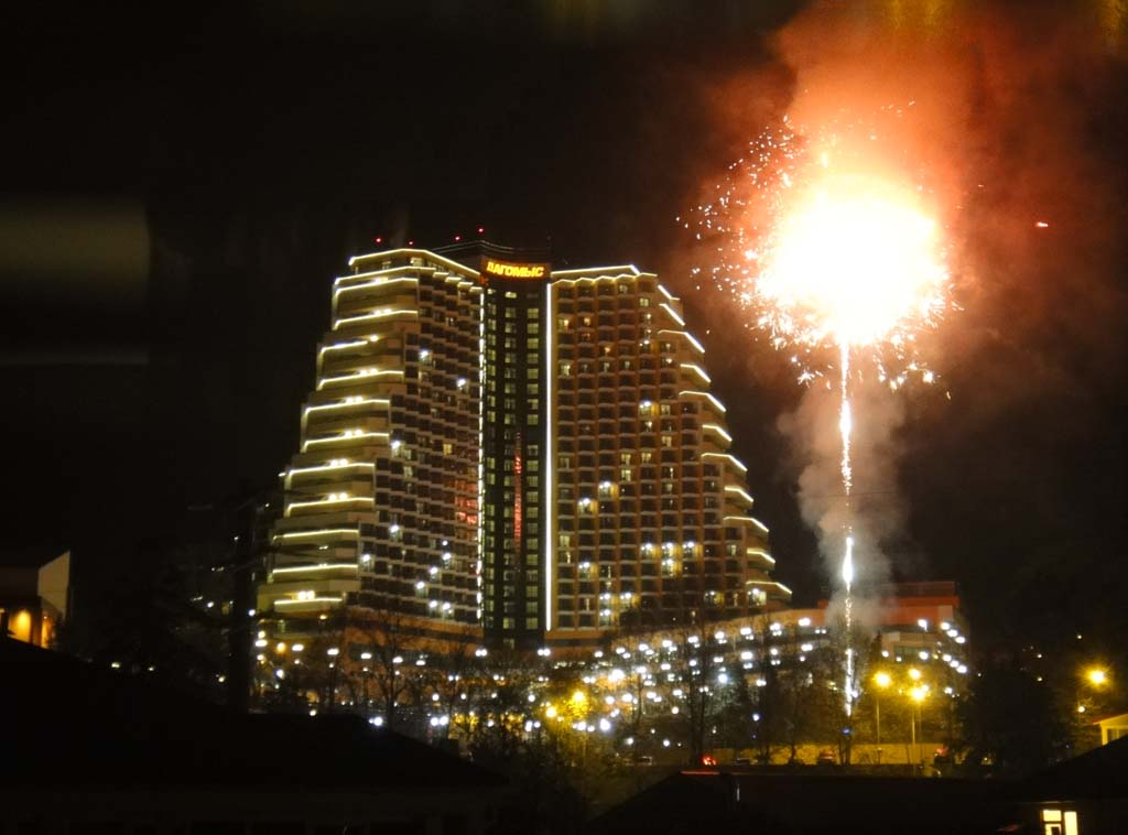 Сочи, Дагомыс: праздничный фейерверк 2 мая